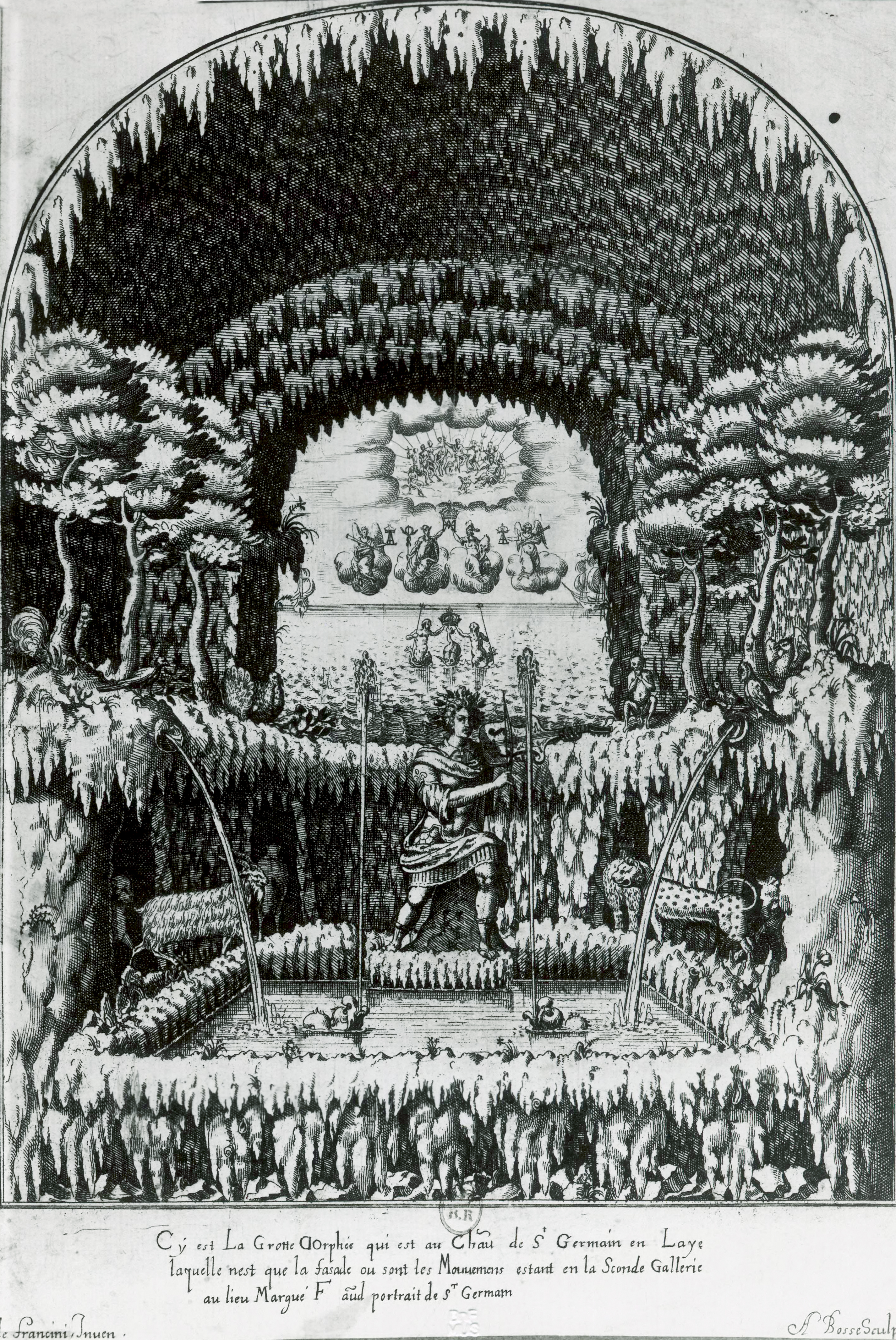 Estampe